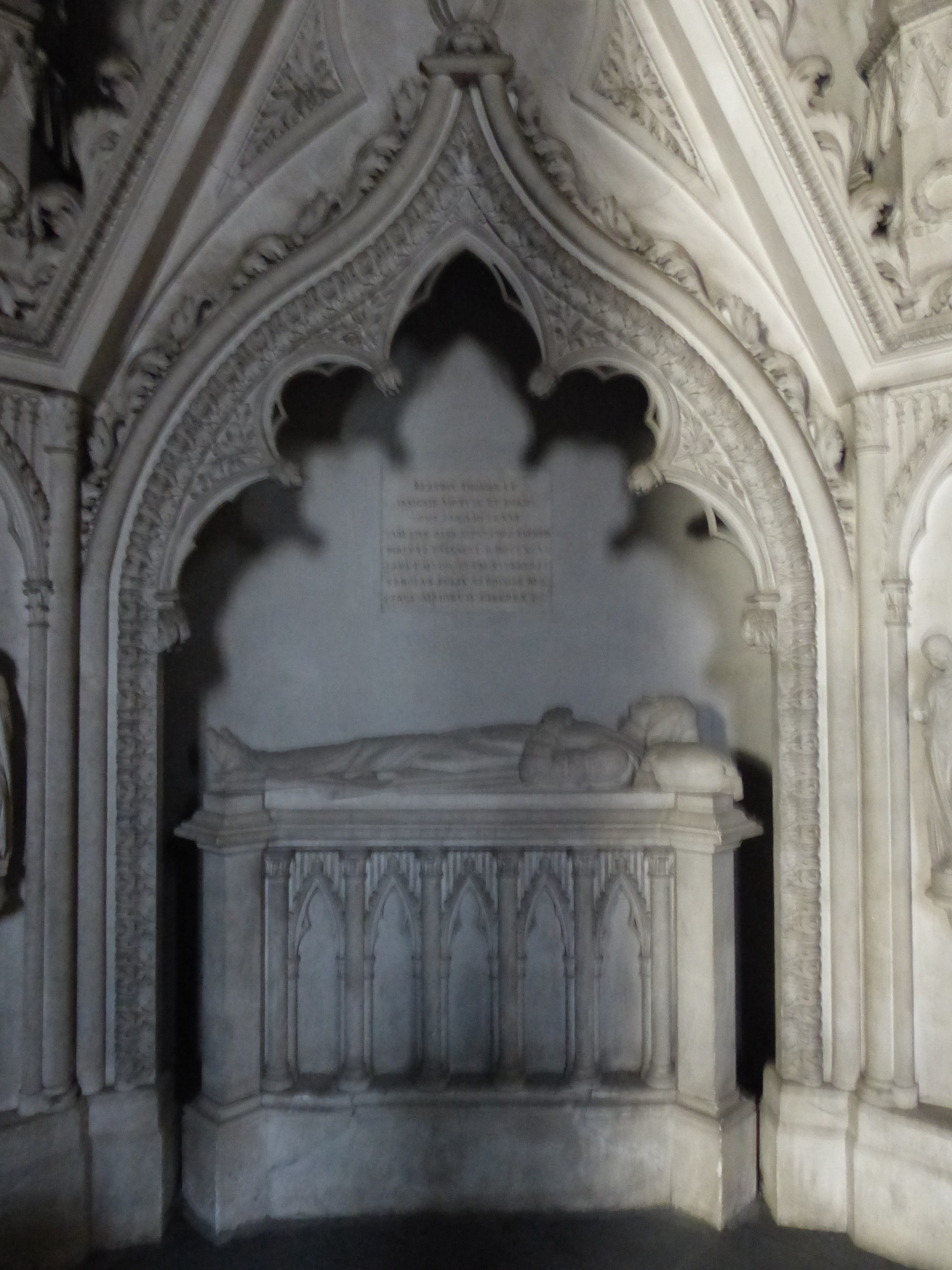 Cénotaphe de Béatrice de Savoie à l'abbaye d'Hautecombe